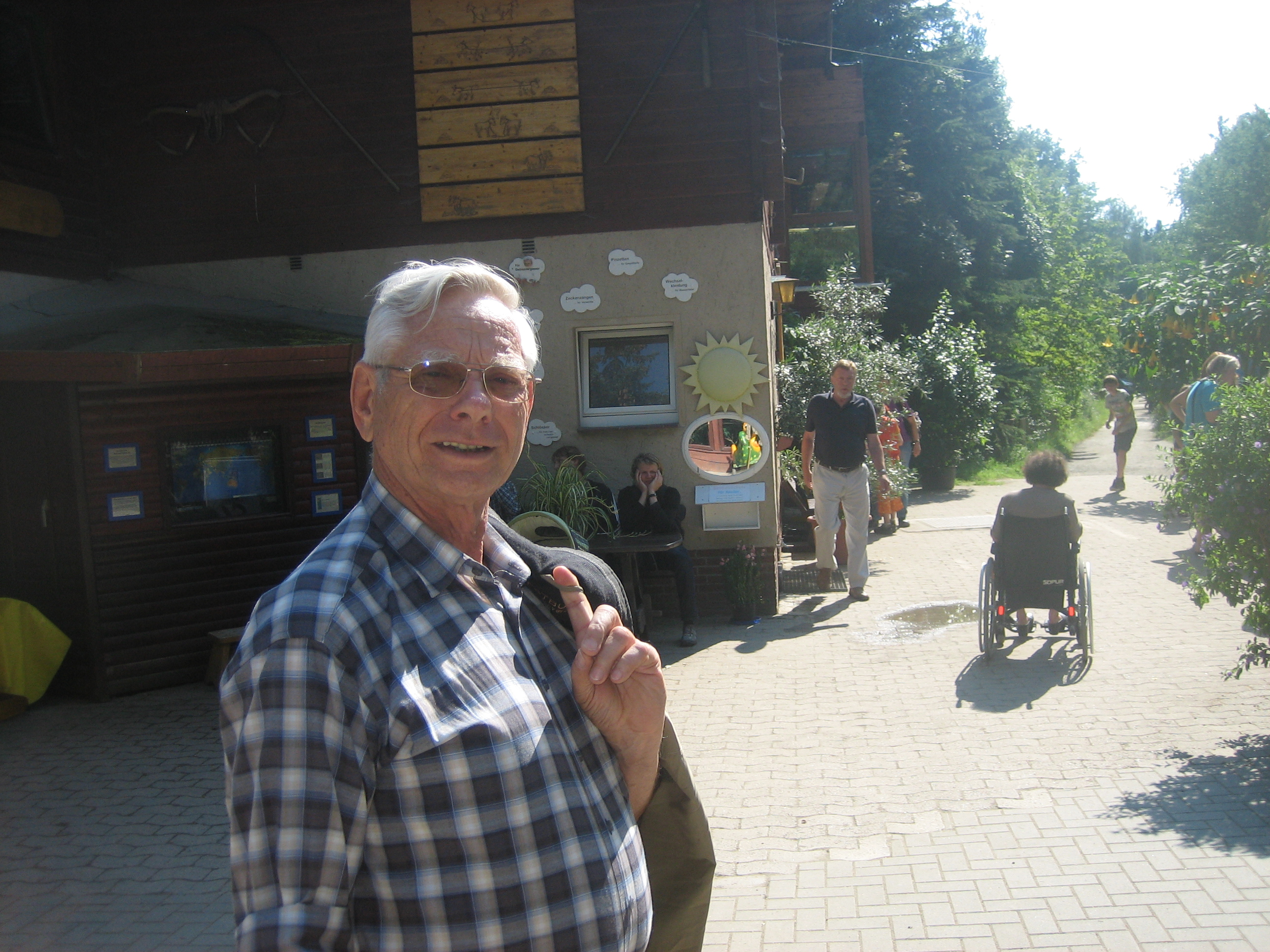 Betreiber Peter Deicke